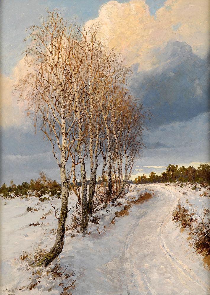 Wintergewitter. Signiert. Öl auf Leinwand, 75 x 55 cm